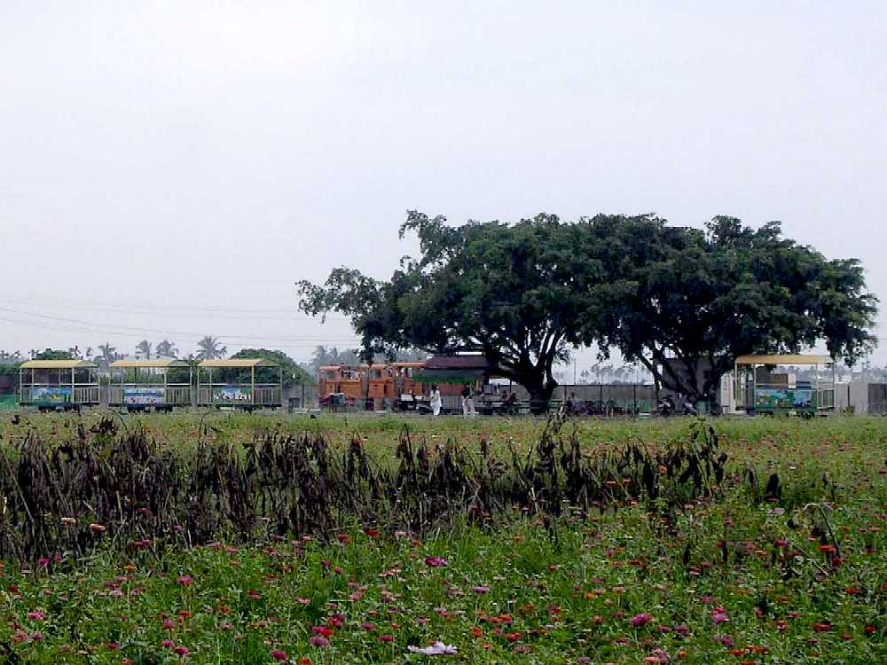 中文（台灣）: 屏東南州糖廠。